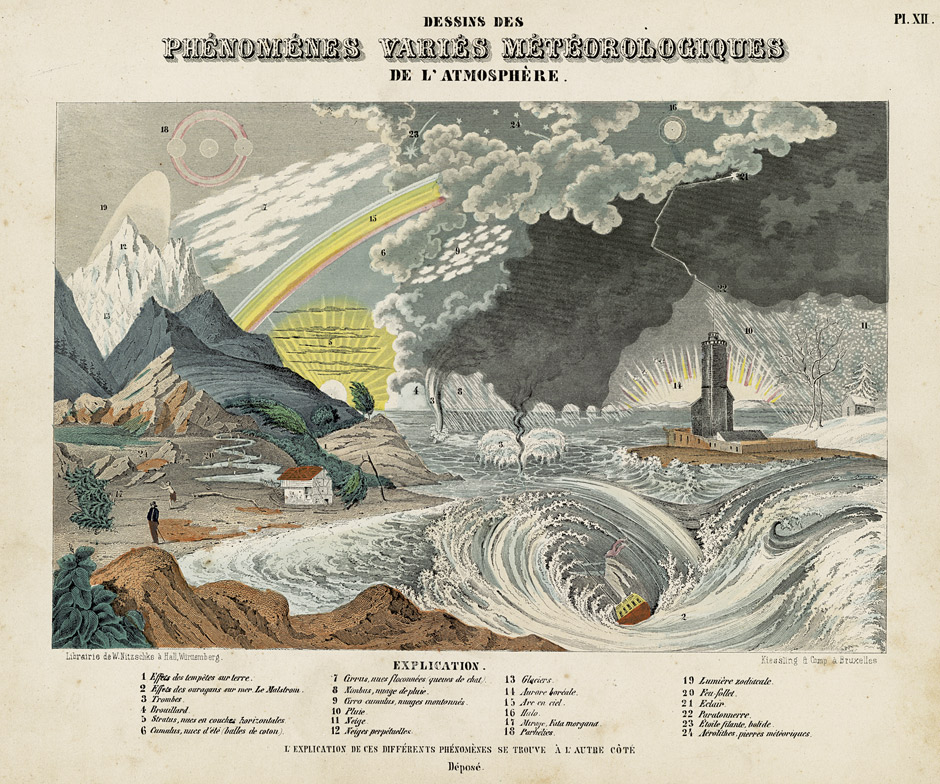 Phénoménes variés météorologiques de l'atmosphère, aus: L. Preyßinger: Astronomie populaire en tableaux transparents, Schwäbisch Hall, W. Nitzschke und Brüssel, Kiessling, um 1856